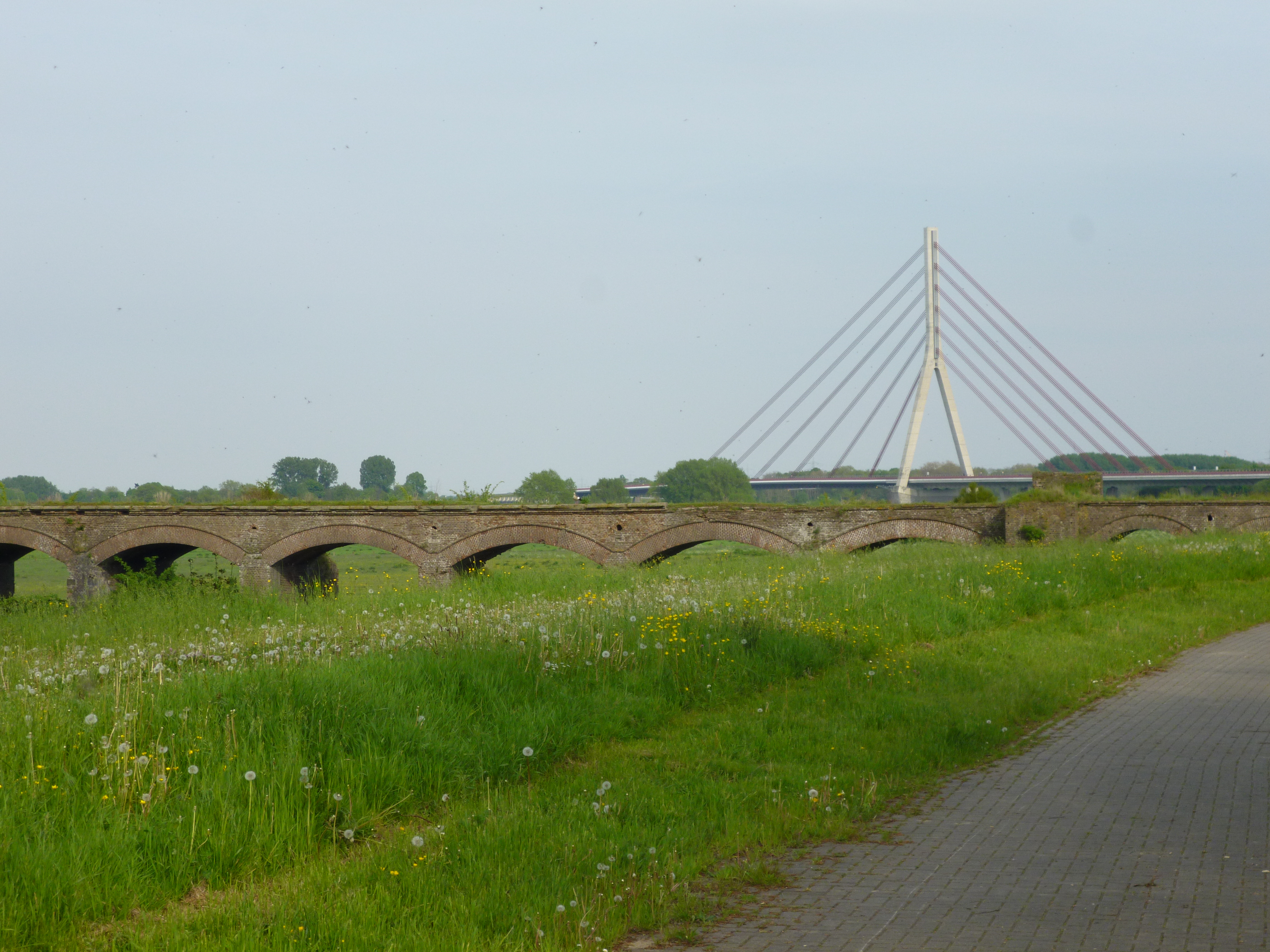 Alte Rheinbrücke Wesel (hier: linksrheinischer Teil im Naturschutzgebiet „Rheinaue zwischen Büderich und Perrich“) mit Blick zur Niederrheinbrücke (Hintergrund)